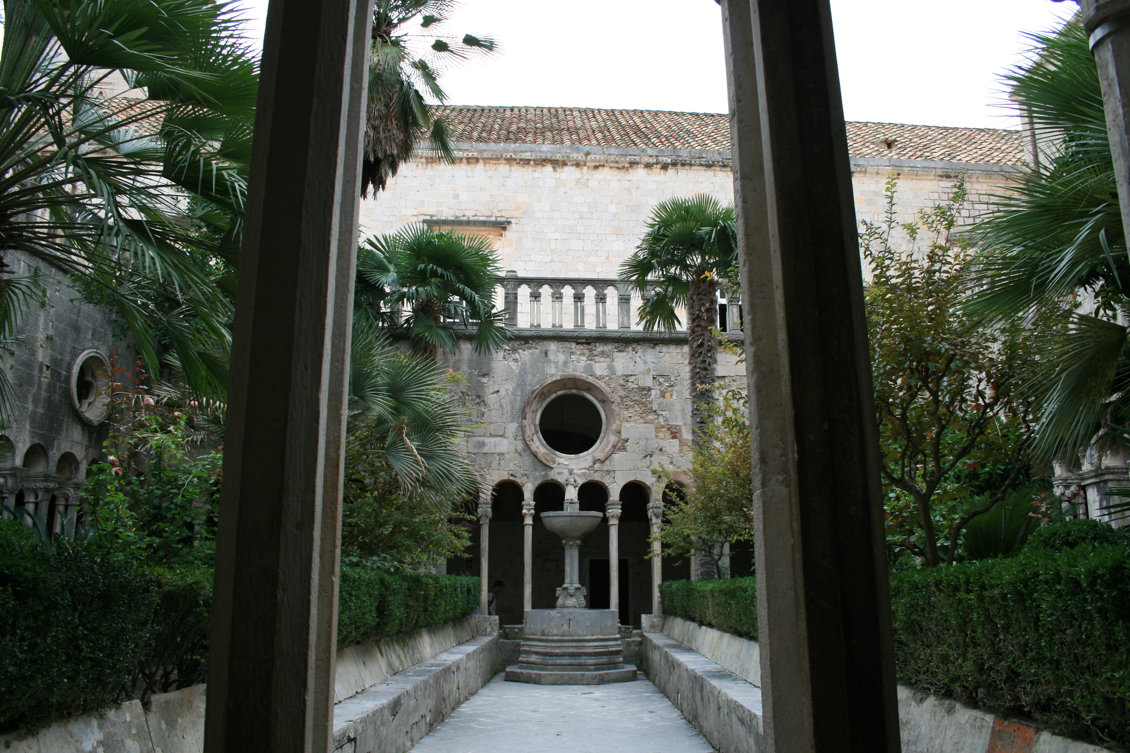 Внутренний двор Францисканского монастыря, Дубровник, Хорватия